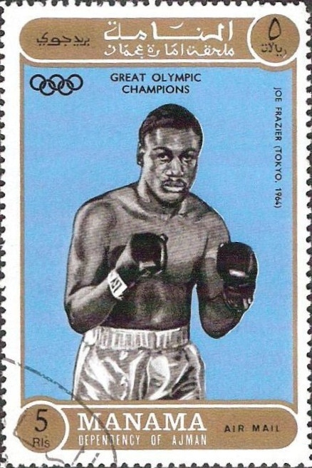 Joe Frazier